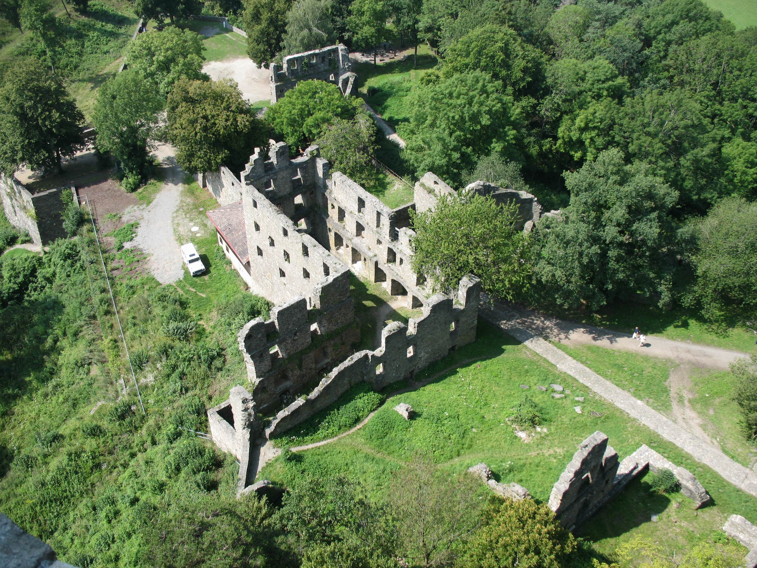 Festung Hohentwiel: Blick von der Oberen Festung auf die Stabsoffizierswohnung. Im Hintergrund die Karlsbastion zu erkennen.